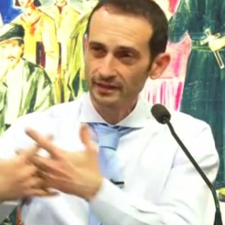 Christian Albini in una conferenza del 2008